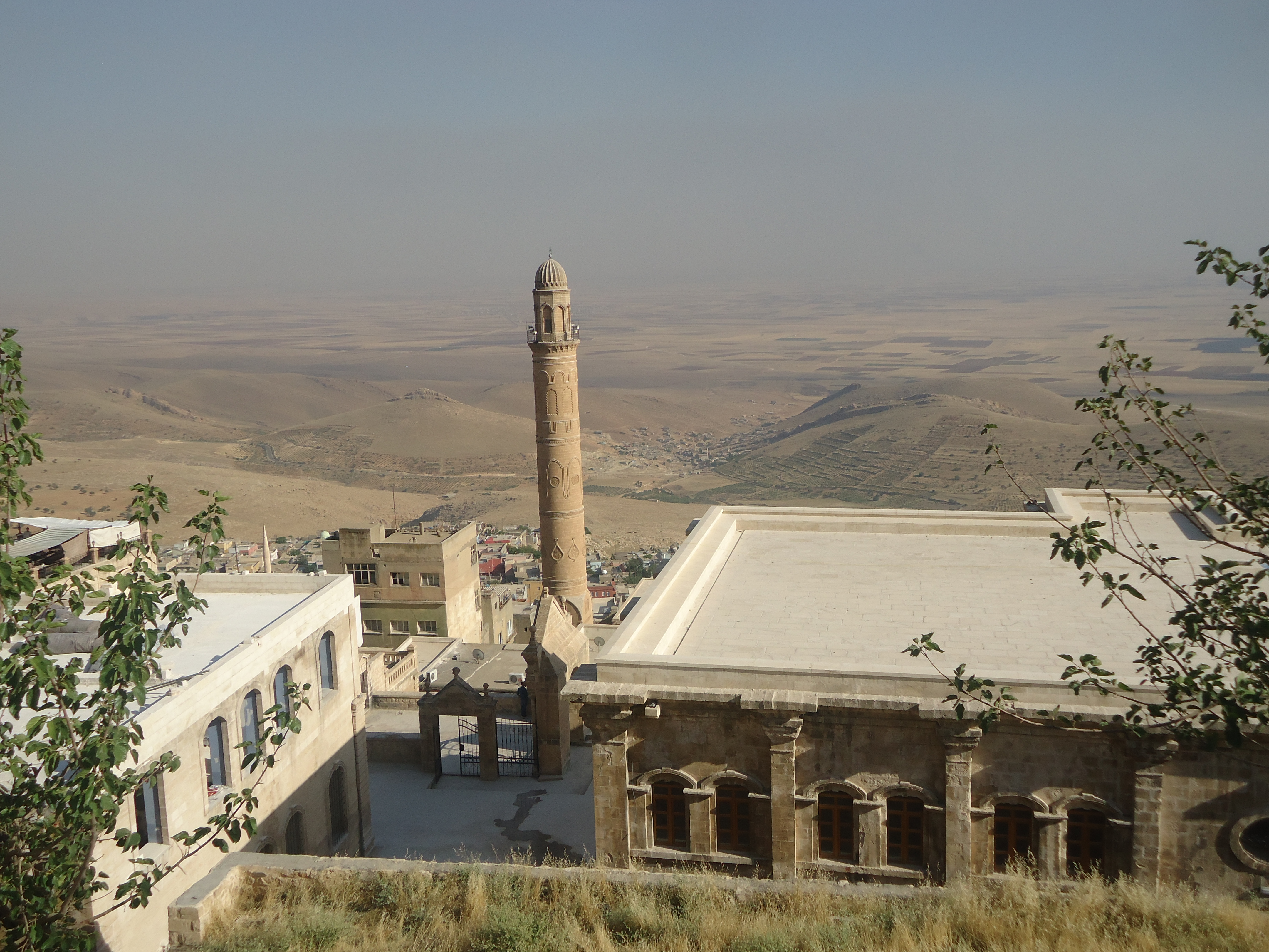 MARDİNDEN MEZOPOTAMYA OVASI